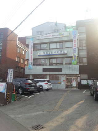 가좌4동 주민센터